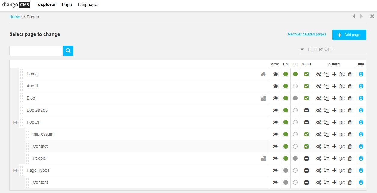 Примерен изглед на част от контролния панел на уеб система за управление на съдържанието (django CMS)